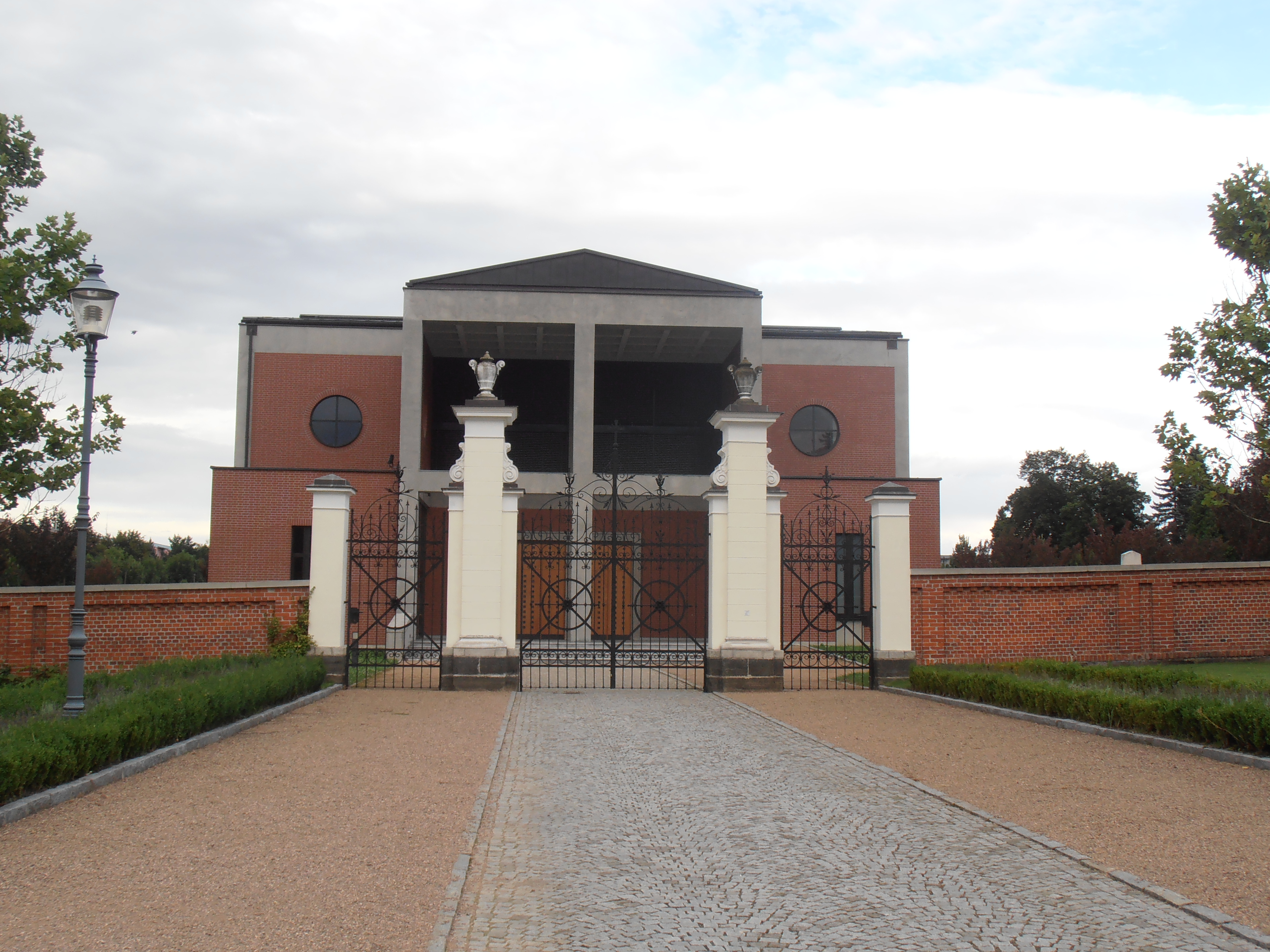 Obřadní síň, Otická, hřbitov, Opava-Předměstí, Opava.